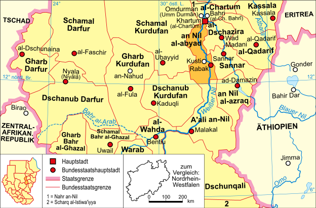 politische Karte des Sudan (Bundesstaat an-Nil al-abyad)